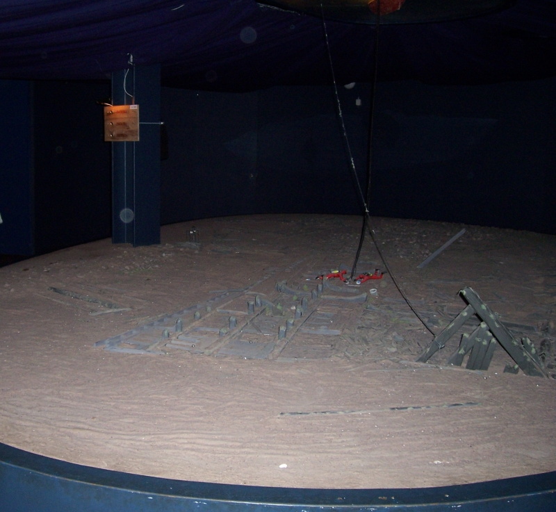 Modell der Ausgrabungsstätte der Kronan im Landesmuseum Kalmar (Schweden)